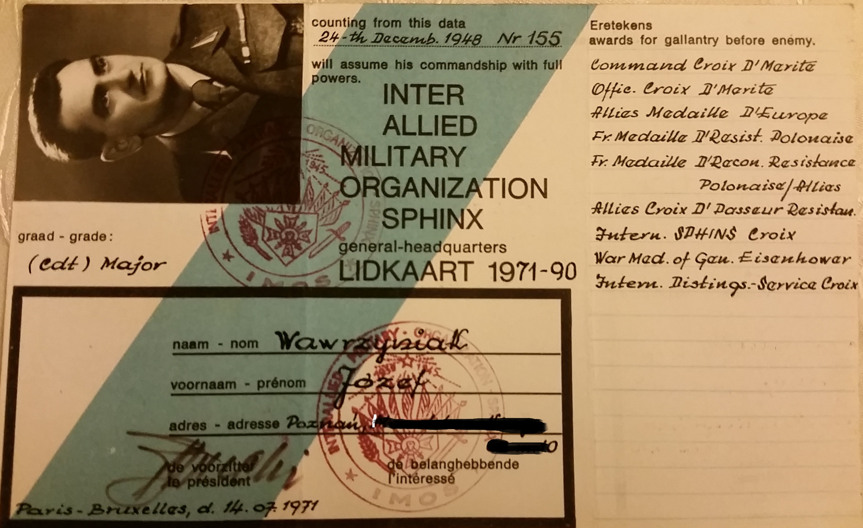 Legitymacja odznaczeń Józefa Wawrzyniaka wydana przez Inter Allied Military Organization Sphinx